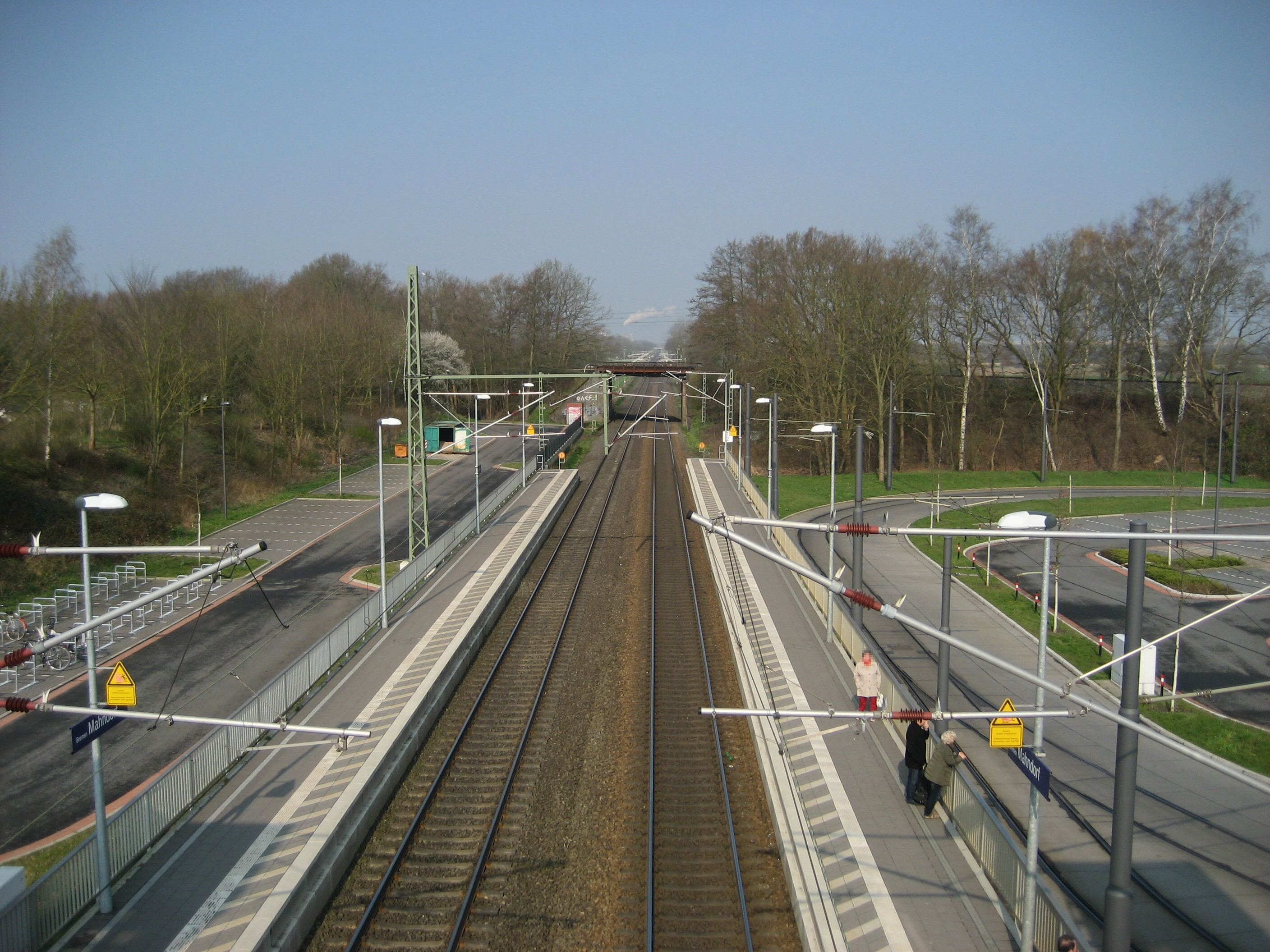 Bahnsteige des Bahnhof Bremen Mahndorf. Blick Richtung Bremen. Rechts Wendeschleife der Straßenbahn 1. Von Fußgängerbrücke aus fotografiert.